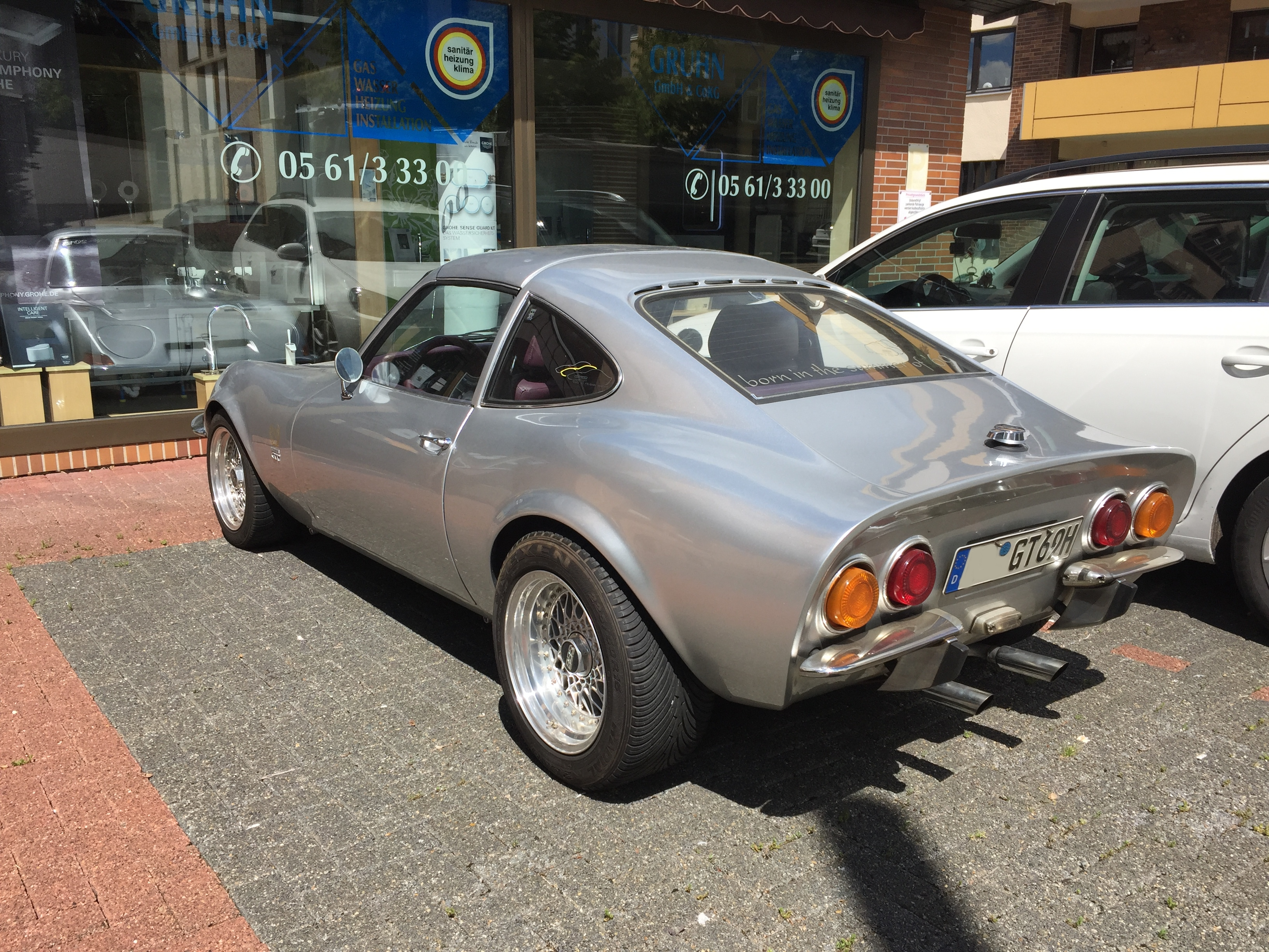 Opel GT Targa-Umbau Heckansicht